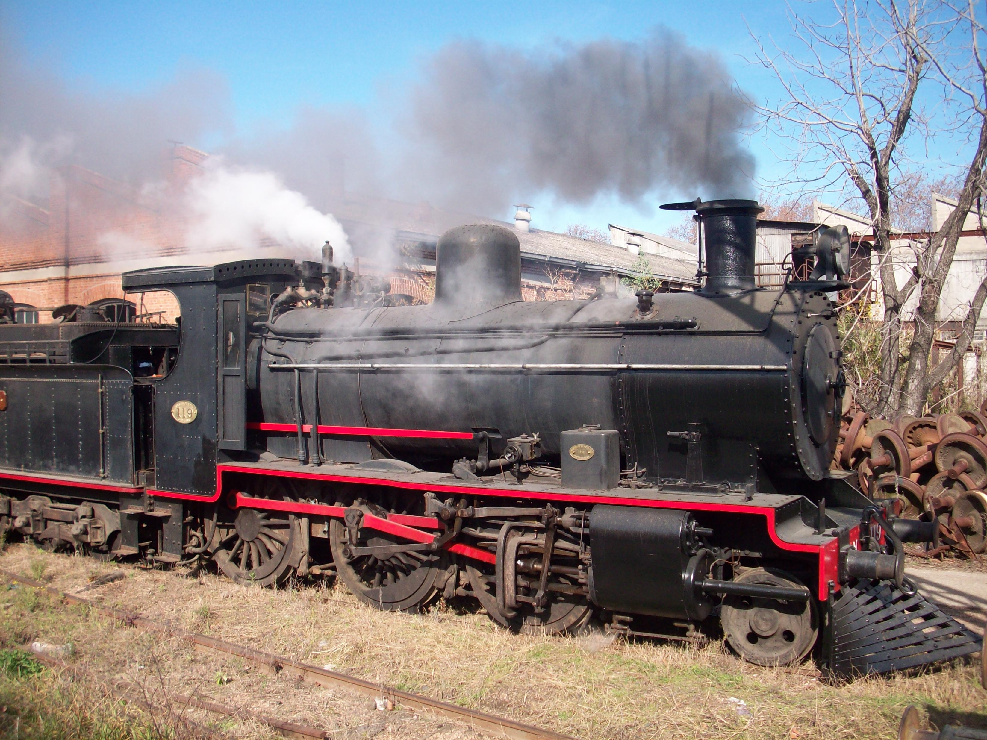 Locomotora N 199 tipo 2 6 0